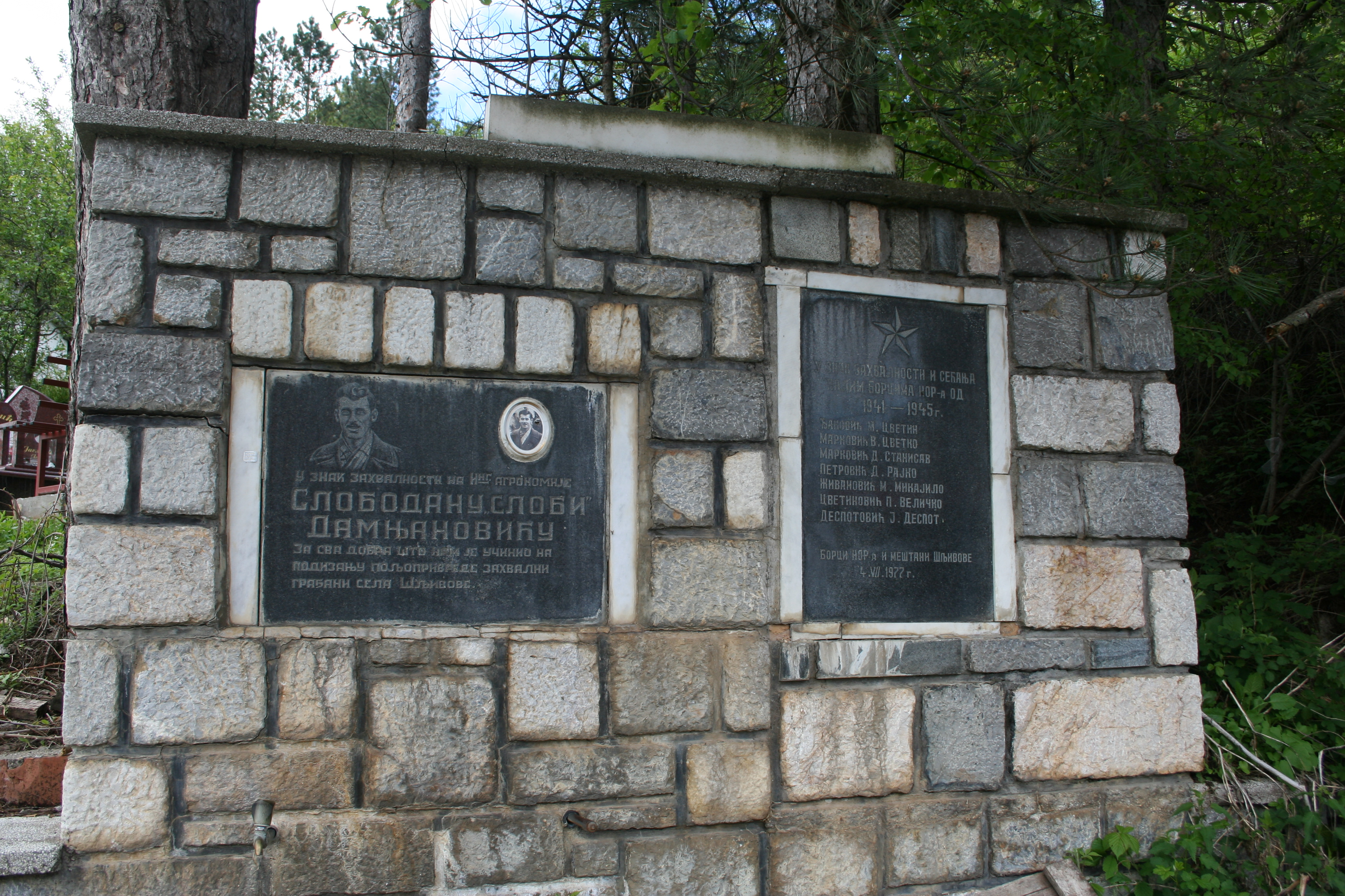 Spomenik u Šljivovi